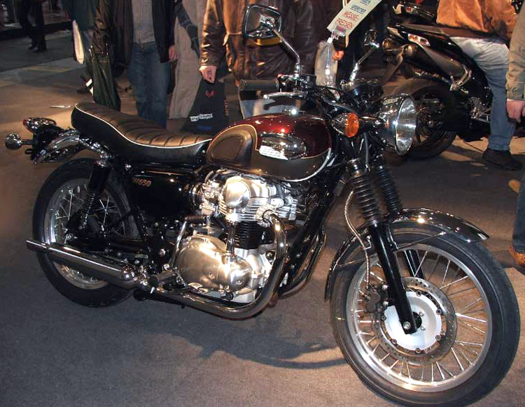 Kawasaki W650 mit Königswellen-Twin-Motor